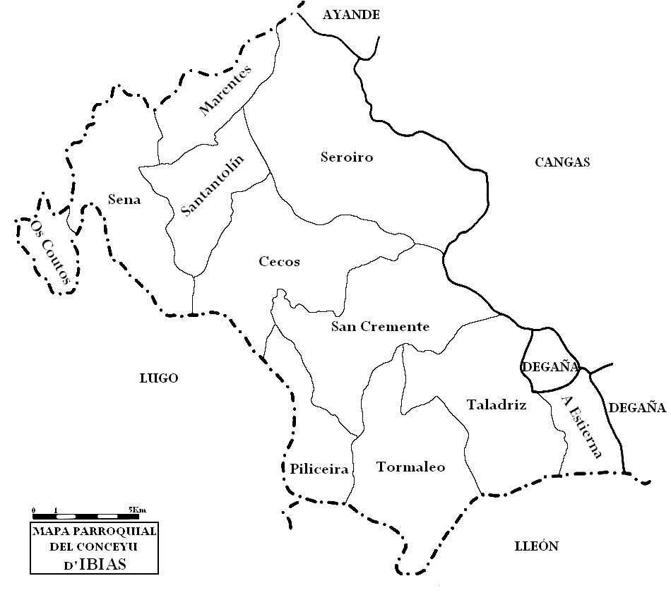 Mapa parroquial del conceyu d'Ibias.